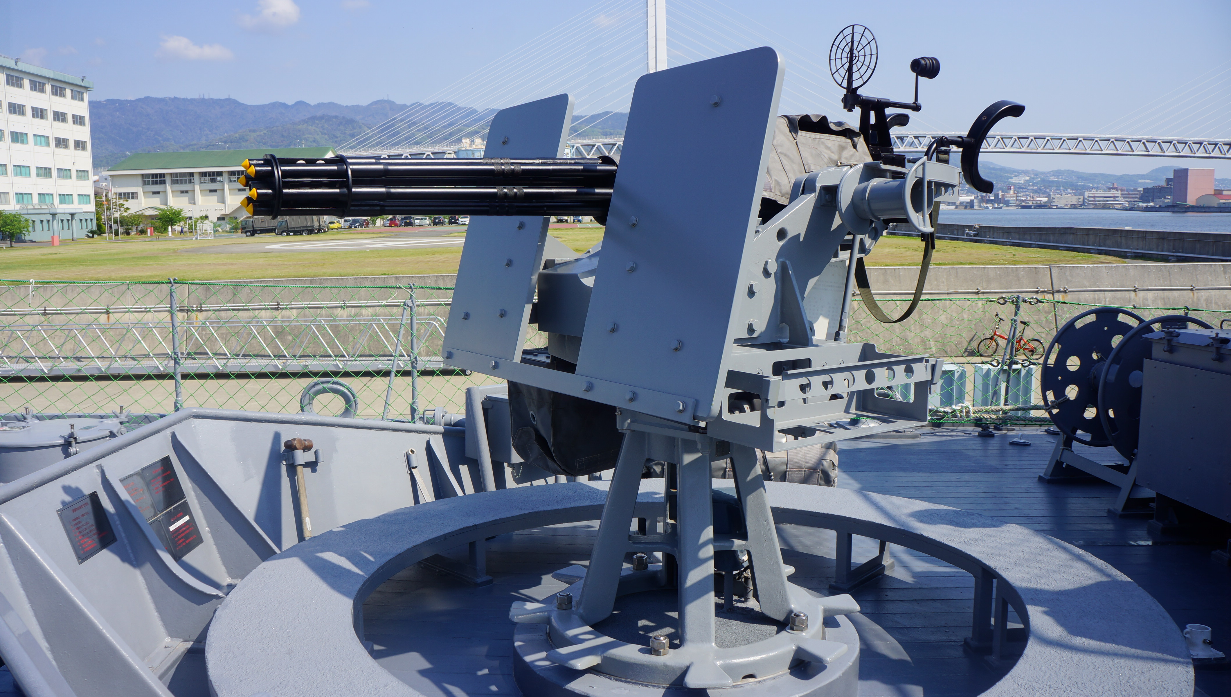 海上自衛隊 掃海艇なおしま（MSC-684） JM61-M20mm多銃身機銃。 2014年4月27日 海上自衛隊阪神基地にて。